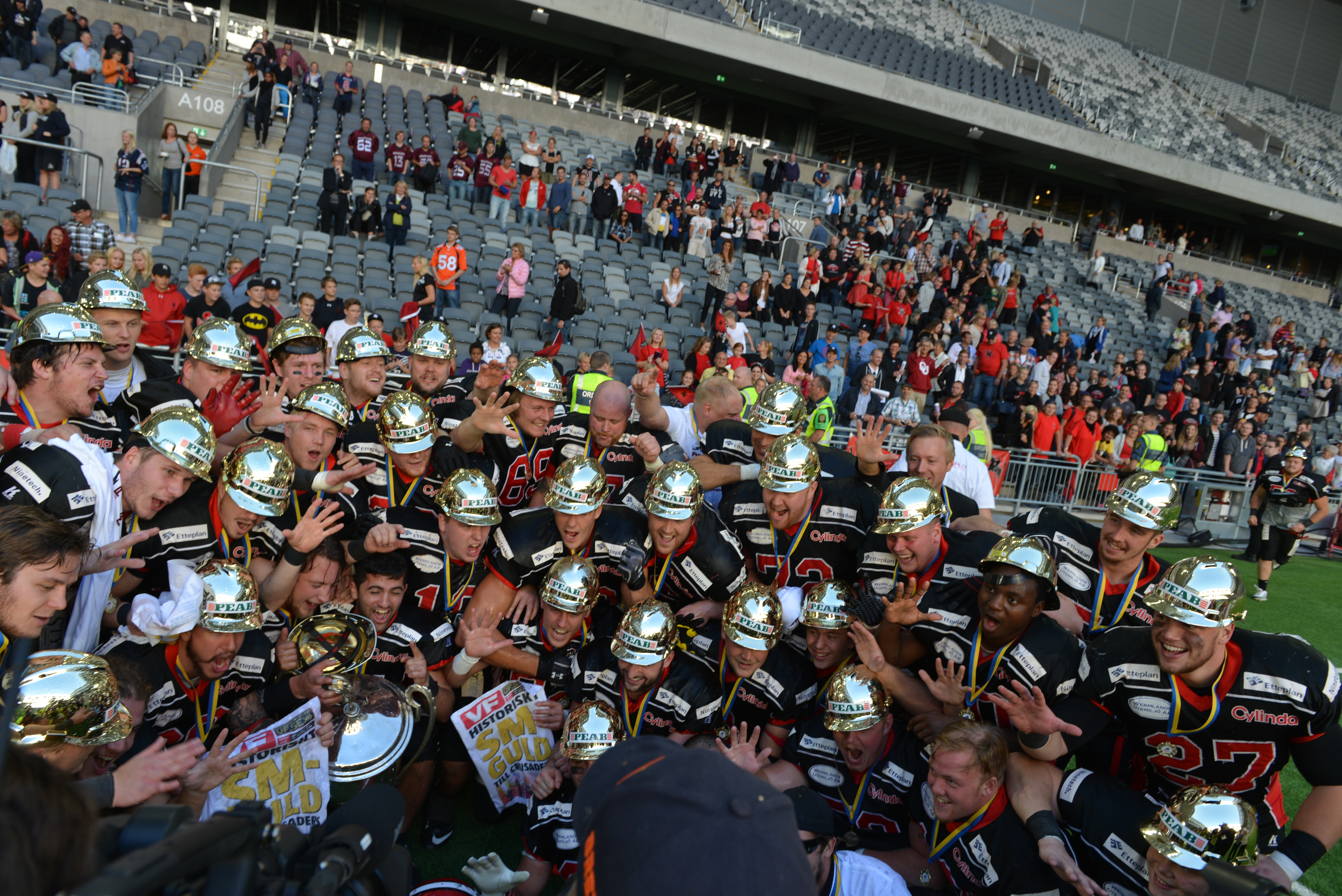 SM-final XXIX i amerikansk fotboll 2014-09-07 mellan Carlstad Crusaders och Öebro Black Knights. Matchen spelades på Tele2 arena och Carlstad vann med 49-9 och vann därmed sitt femte raka SM-guld. This file was made possible through the pool of technology at Wikimedia Sverige.